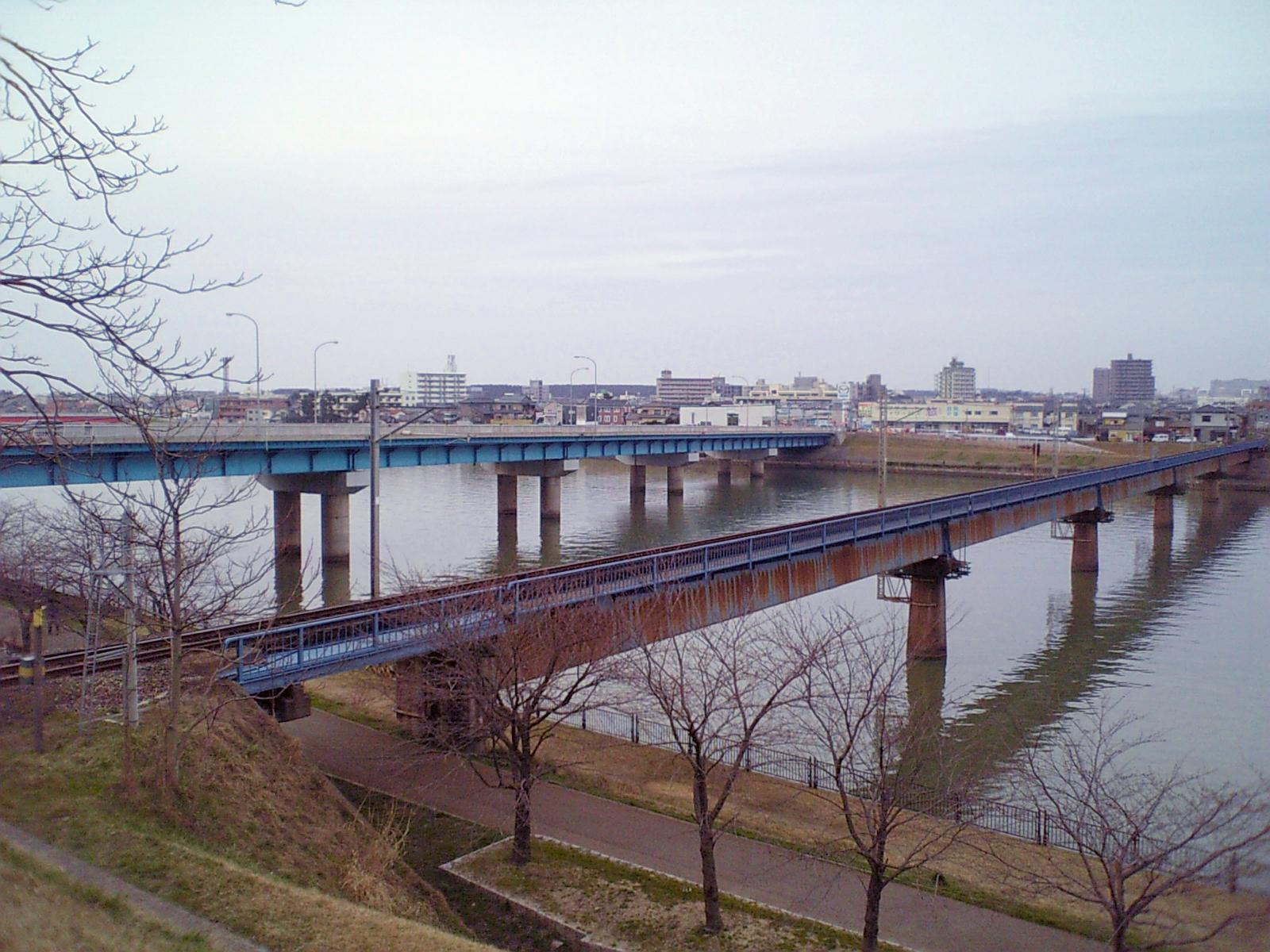 有明大橋（ありあけおおはし）。新潟県新潟市の関屋分水に架かる新潟市道曽和インター信濃町線（西大通り）の道路橋梁。